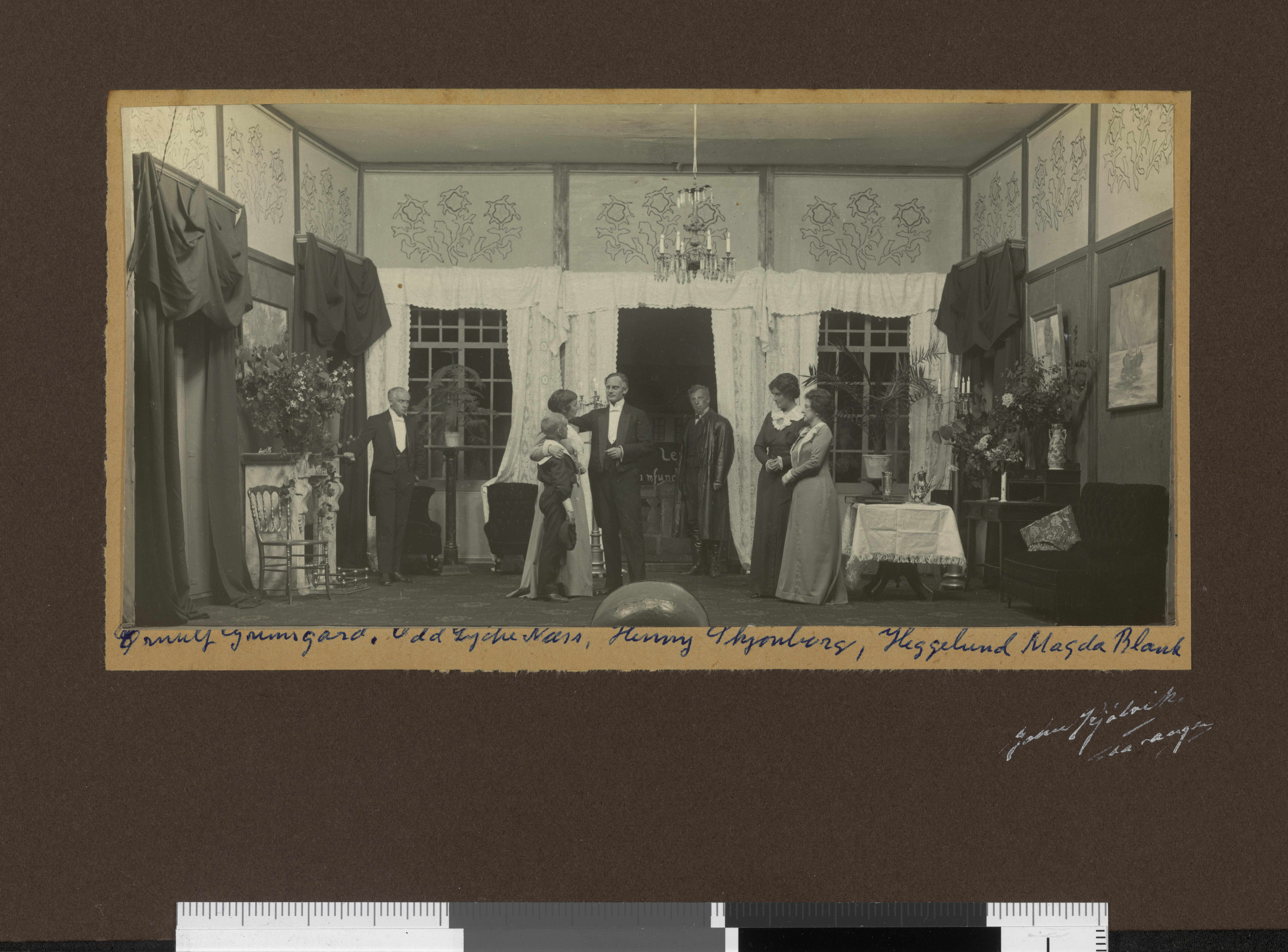 Bildet er hentet fra Nasjonalbibliotekets bildesamling Depicted person: Skjønberg, Henny Depicted person: Heggelund, Oscar Depicted person: Blanc, Magda Depicted person: Grimsgård, Ørnulf Depicted person: Næss, Odd Lyche